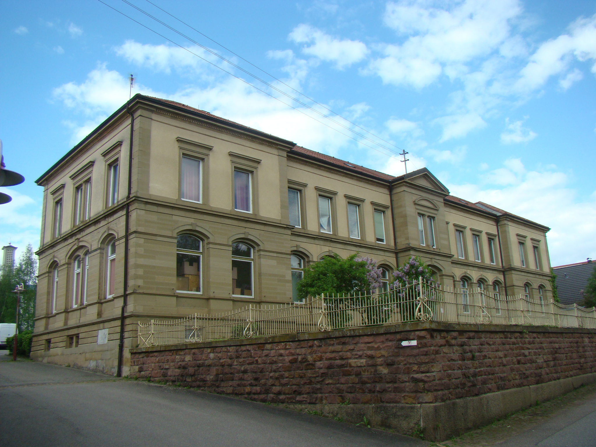 Helmstadt-Bargen, Ortsteil Helmstadt, Schulhaus